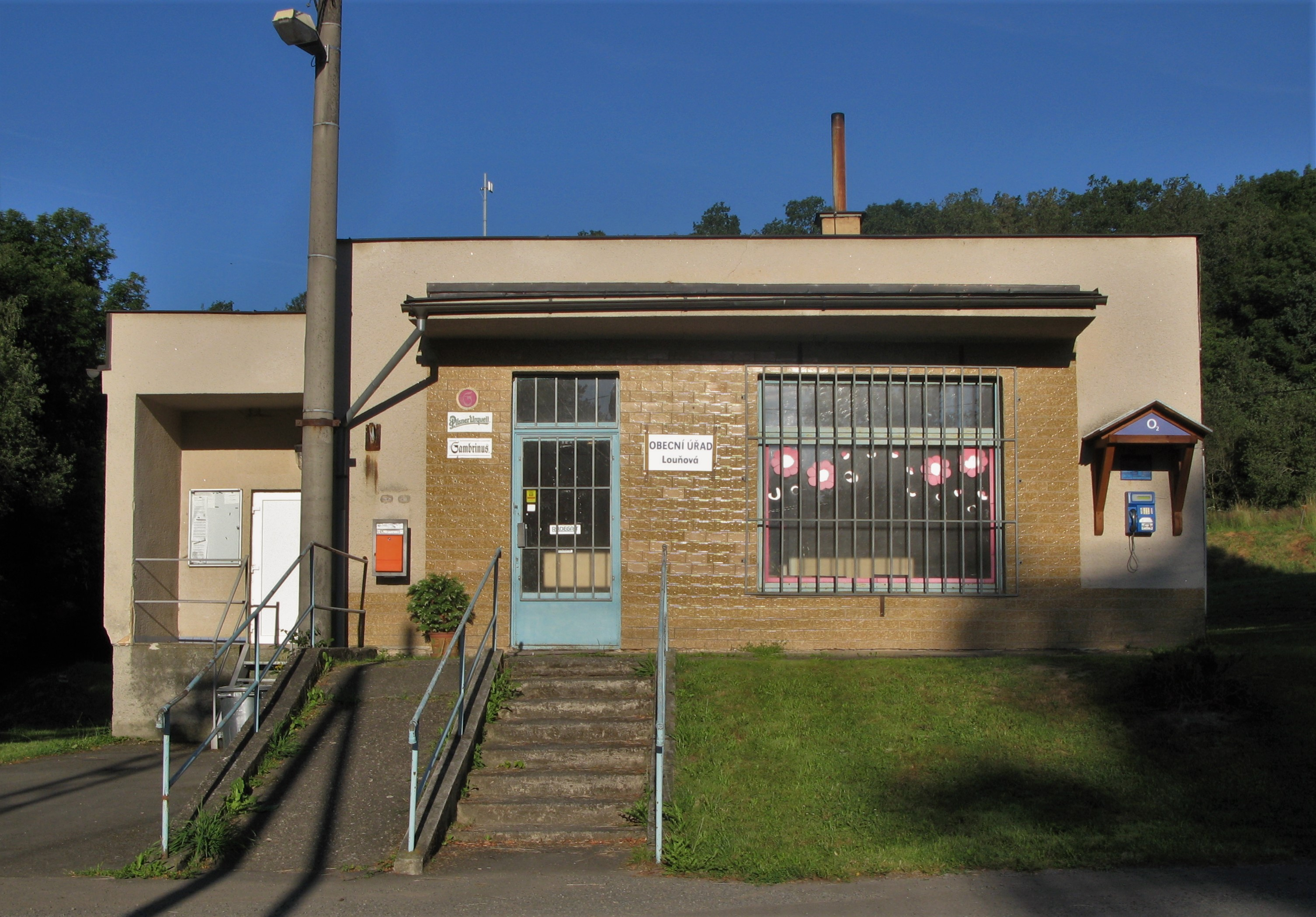 Obecní úřad obce Louňová.